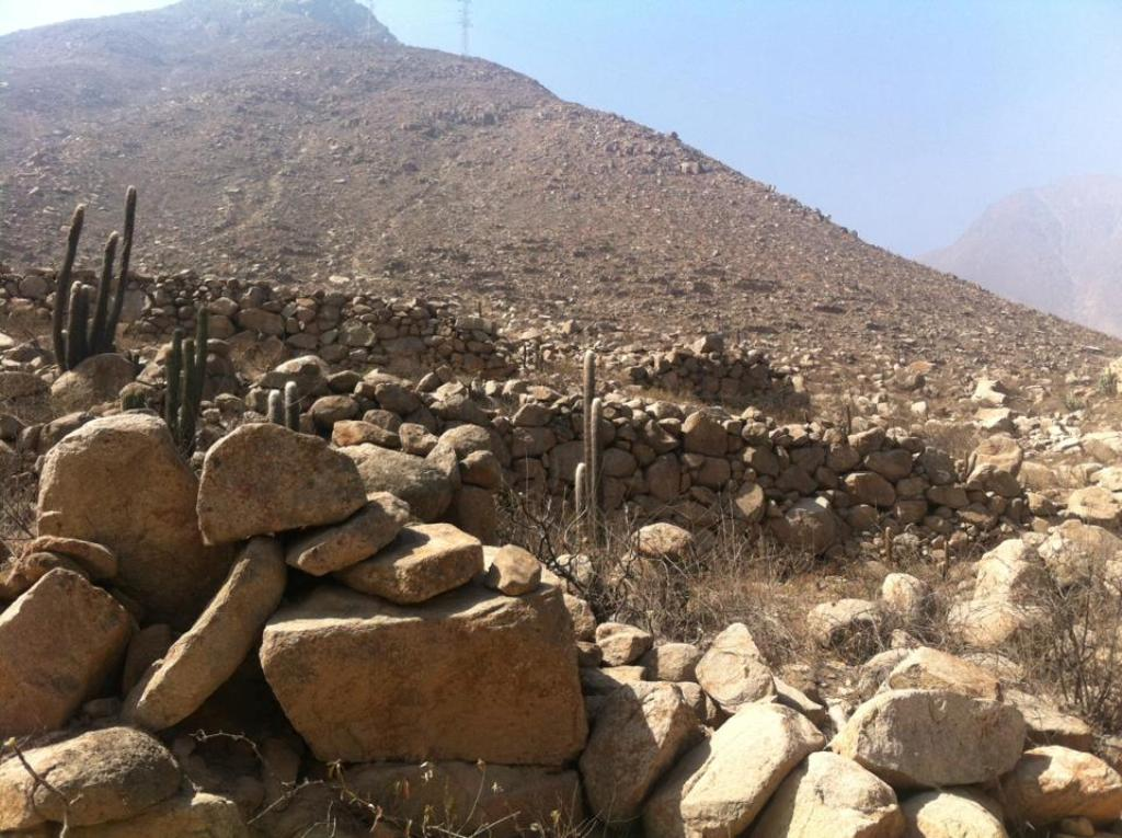 SITIO ARQUEOLÓGICO DE CASCASHOKO EN LA LOCALIDAD DE PURUNHUASI, DISTRITO DE CALLAHUANCA PROVINCIA DE HUAROCHIRI, LIMA PROVINCIAS, PERU